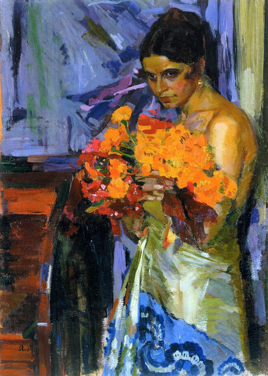 Ukrainian: Жінка з квітами